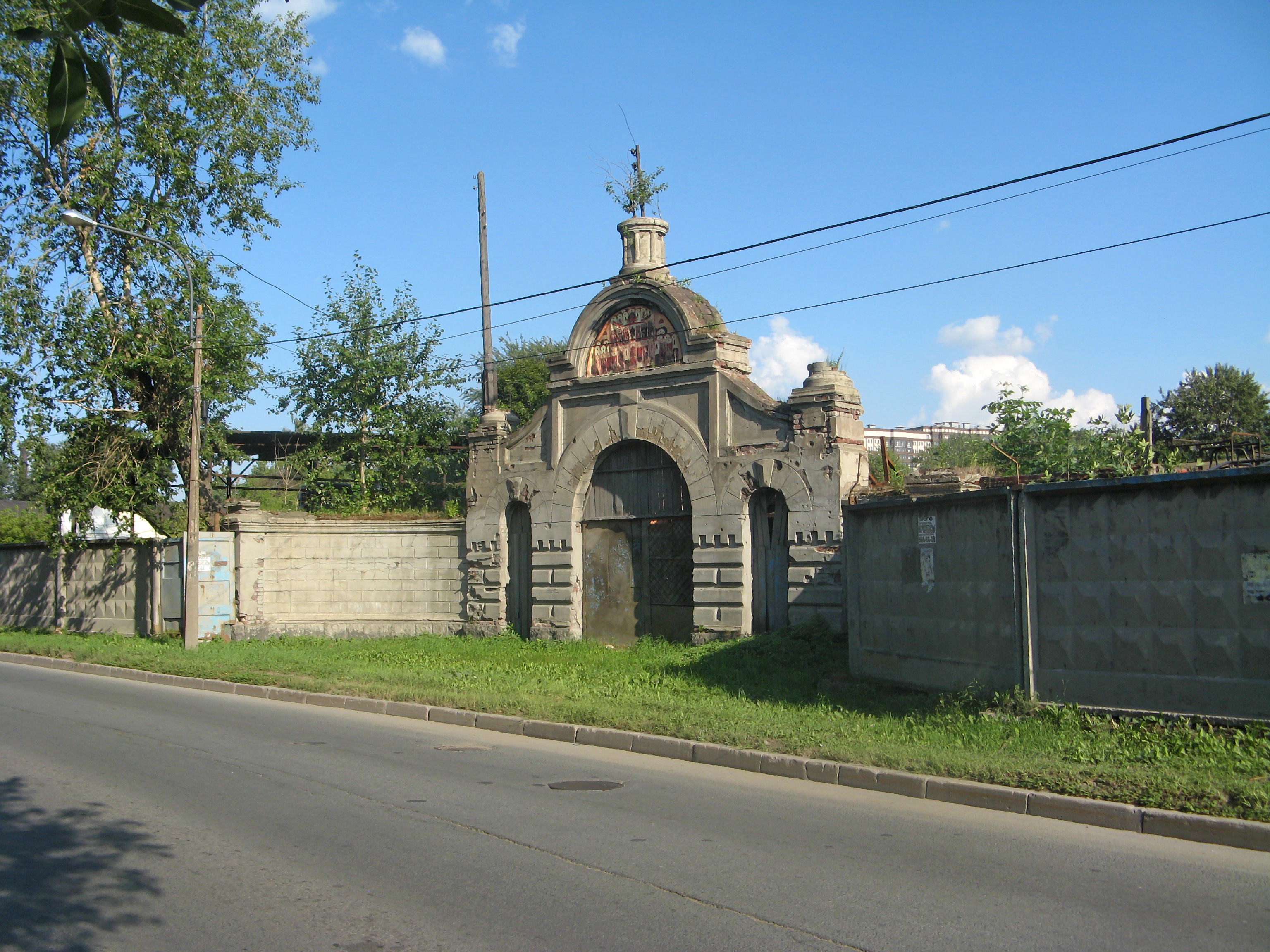 Ворота Громовского старообрядческого кладбища: Старообрядческая улица, 6, Московский район, Санкт-Петербург